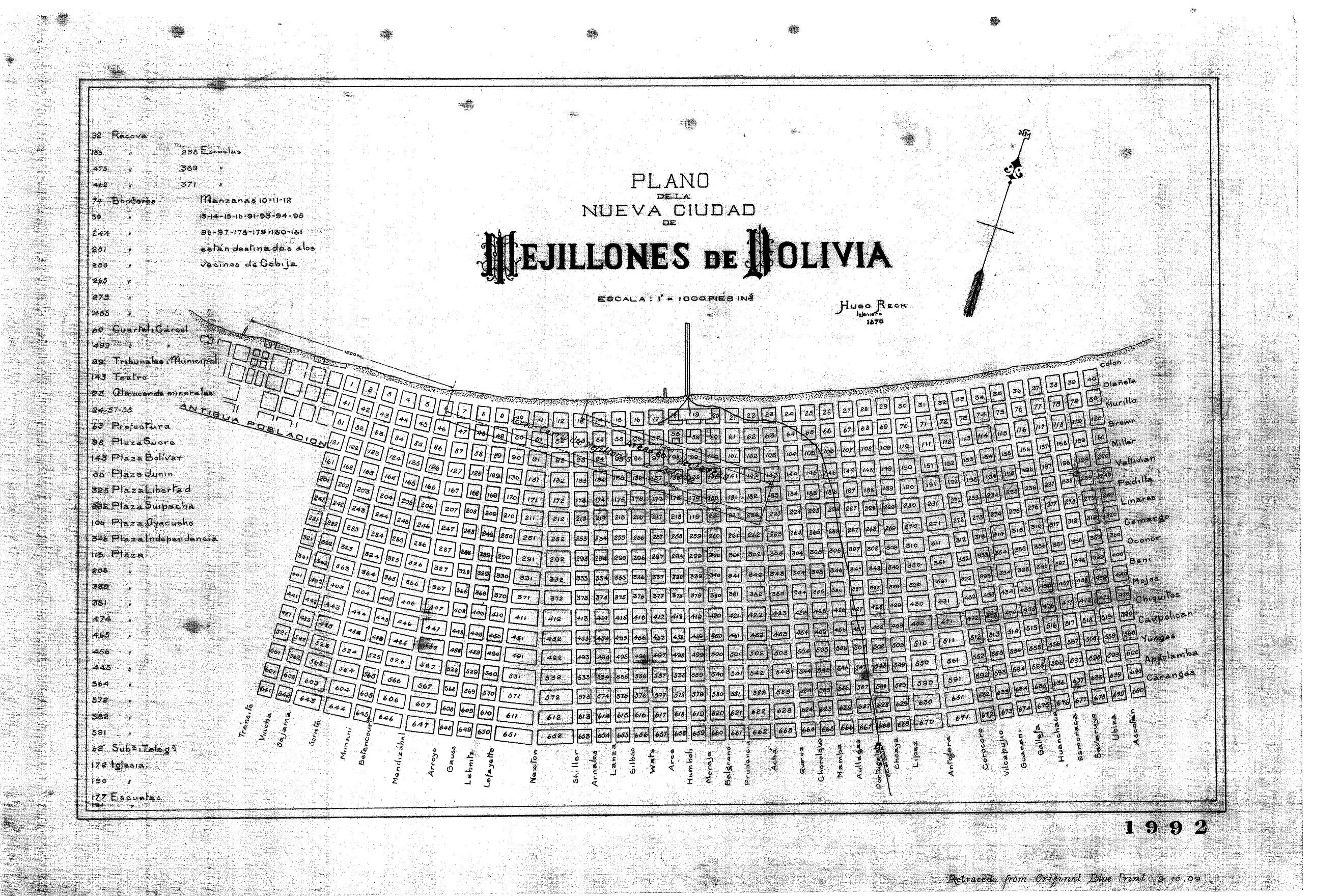 Plano realizado por Hugo Reck en 1870 para el plan de urbanismo y diseño del territorio del Puerto de Mejillones.